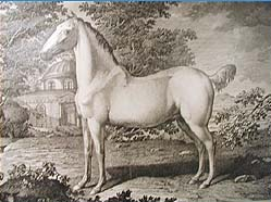 Ulrich Ludwig Wolf, Condé (Kupferstich)